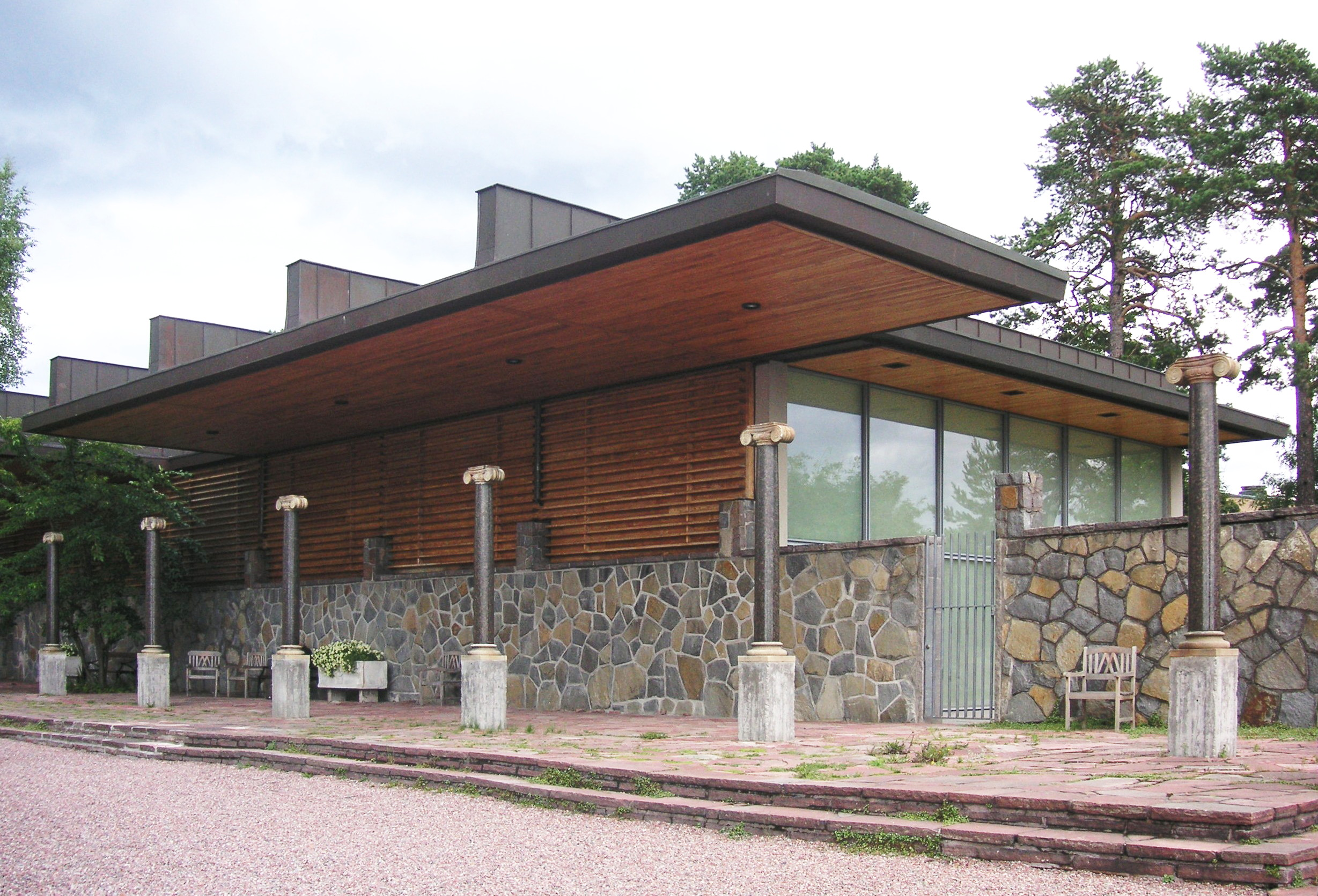 Arkitekt Johan Celsings konsthall på Millesgården, Lidingö